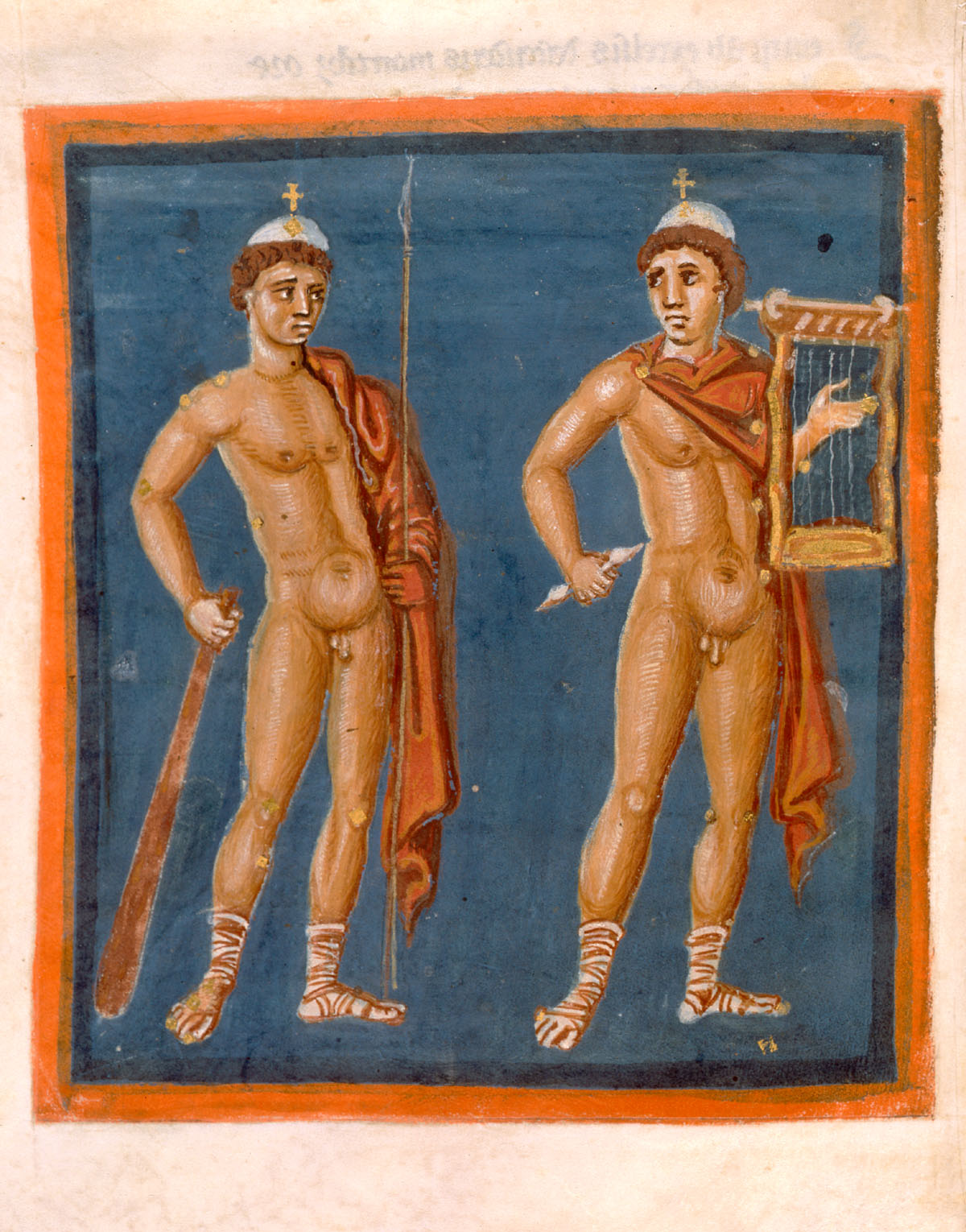 Fol. 16v Gemini